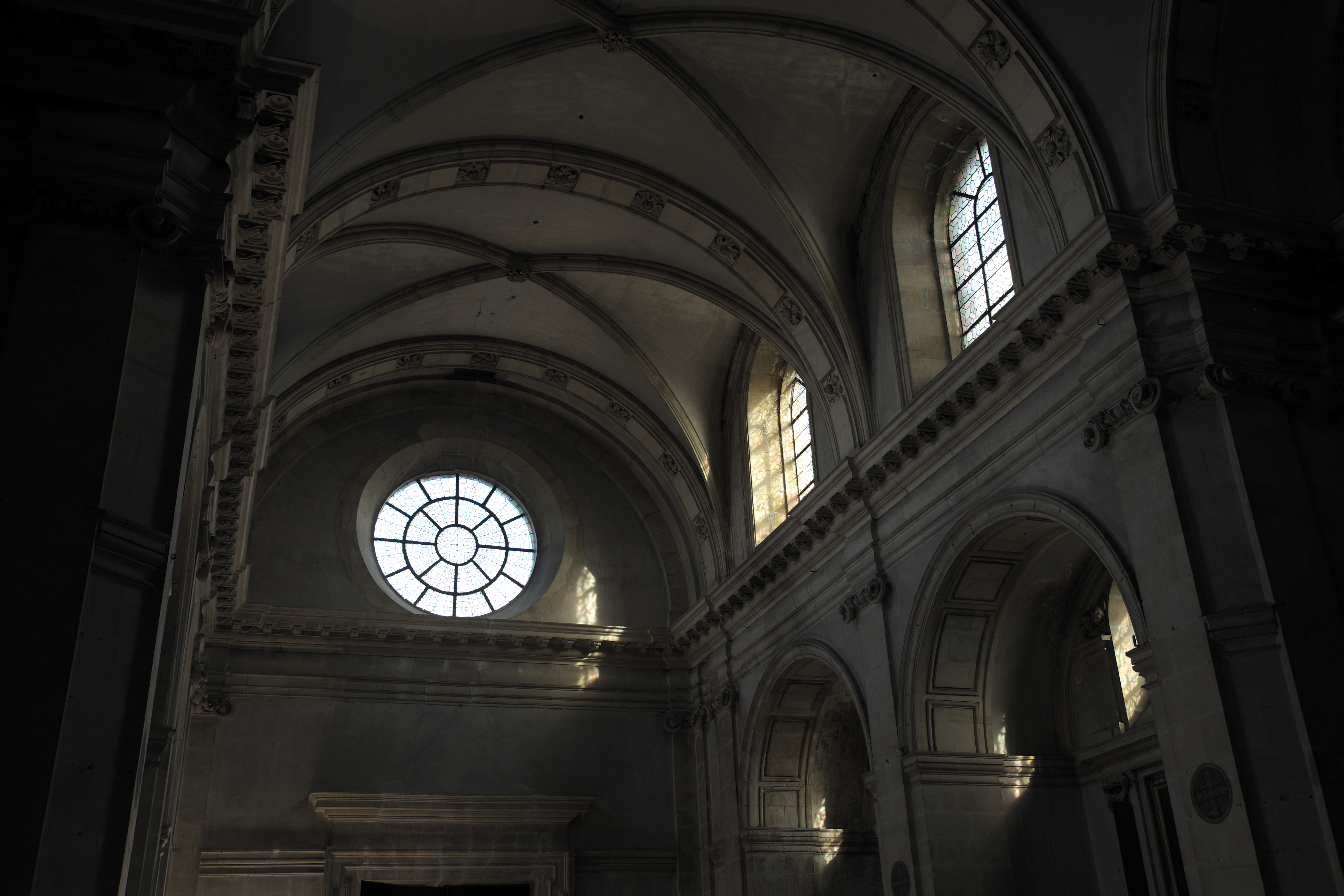 Kapelle Saint-Joseph, ehemalige Kapelle des Ordens von der Heimsuchung Mariens (Chapelle de la Visitation) in Moulins im Département Allier (Auvergne-Rhône-Alpes/Frankreich), Innenraum